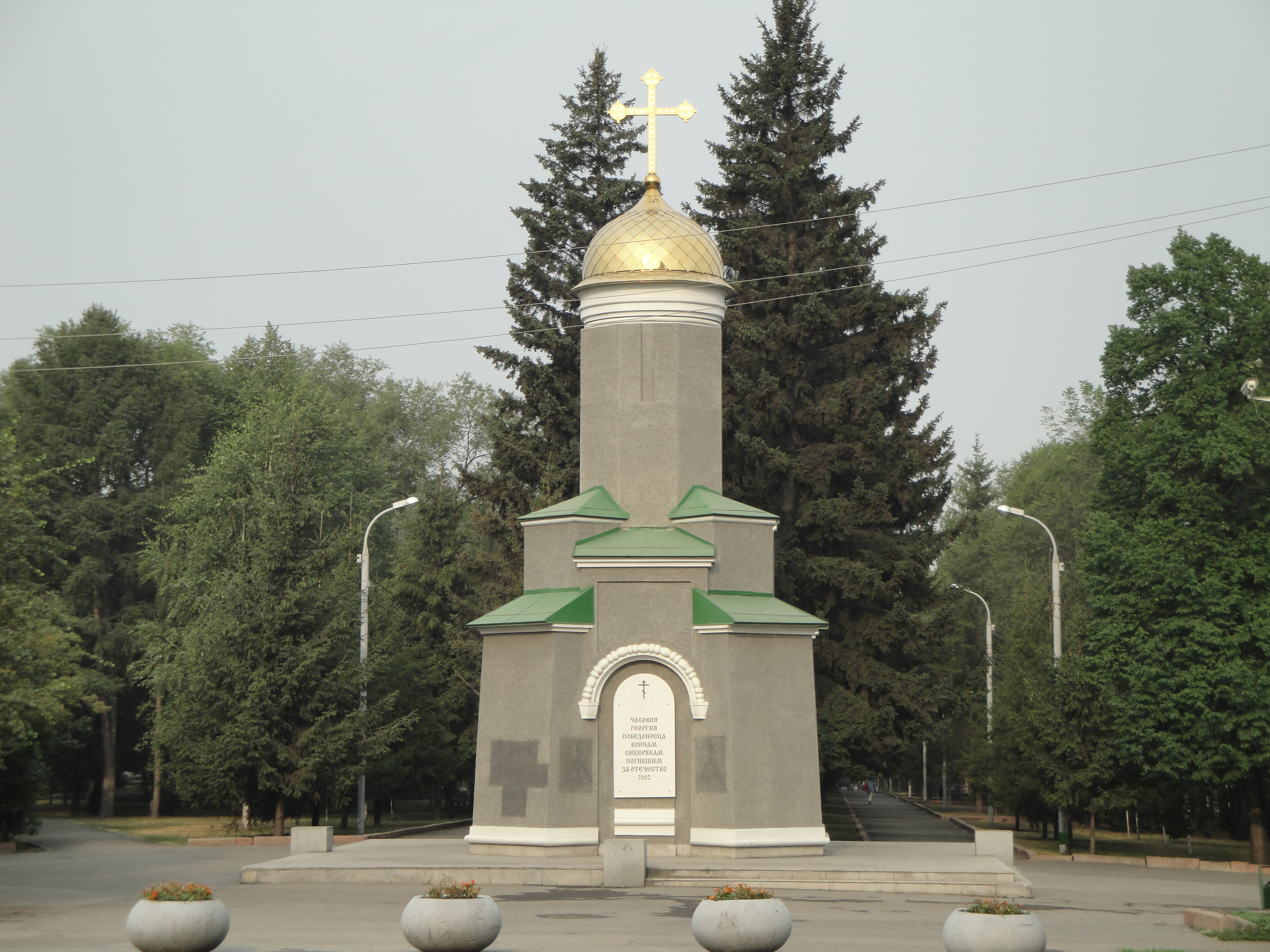 Часовня Георгия Победоносца, установленная на Монументе Славы. Посвящена воинам-сибирякам, погибшим за Отечество.